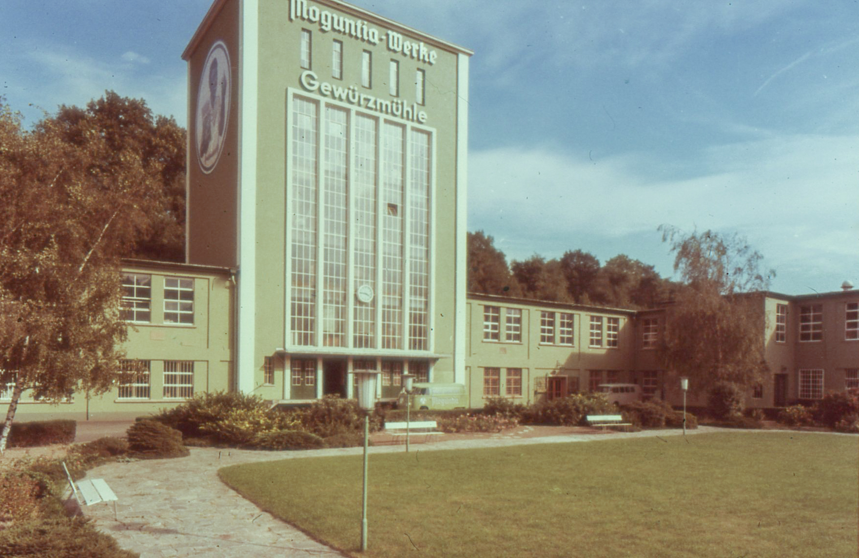 Gewürzwerk in Mainz